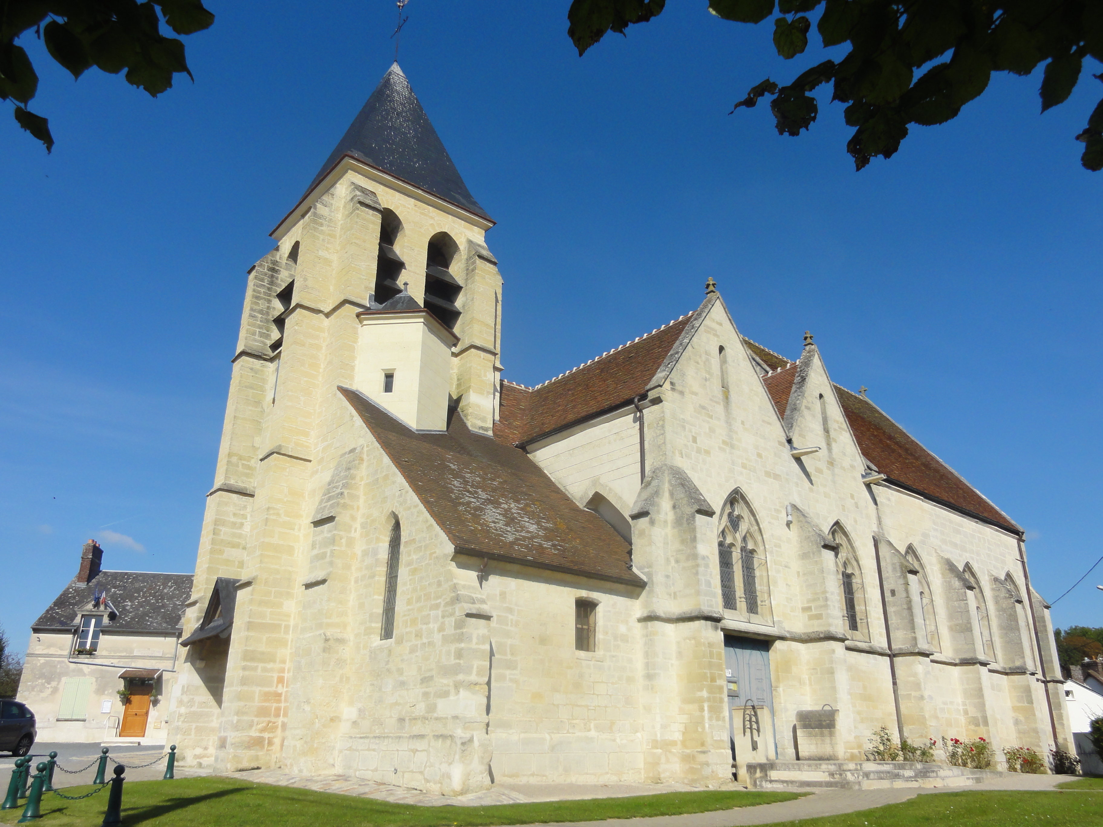 Église Saint-Jean-Baptiste de Crouy-en-Thelle (voir titre).